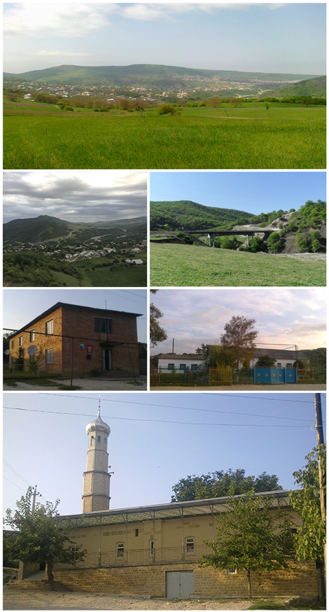 Мозаичное фото Калининаул (Казбековского района)